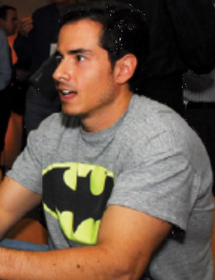 Brazilian actor Felipe Folgosi.Felipe Folgosi – Actor